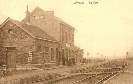 Carte postale représentant l'ancienne gare de Marenne démolie dans les années 80.